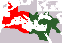 החלוקה של האימפריה הרומית למערב ומזרח, החל משנת 284 לספירה, ושיא גודלם של החלקים השונים. החלק האדום הוא האימפריה הרומית המערבית, החלק הירוק הוא האימפריה המזרחית. התמונה נעשתה על בסיס , ועל סמך אטלס 2000 של הוצאת ידיעות אחרונות. .